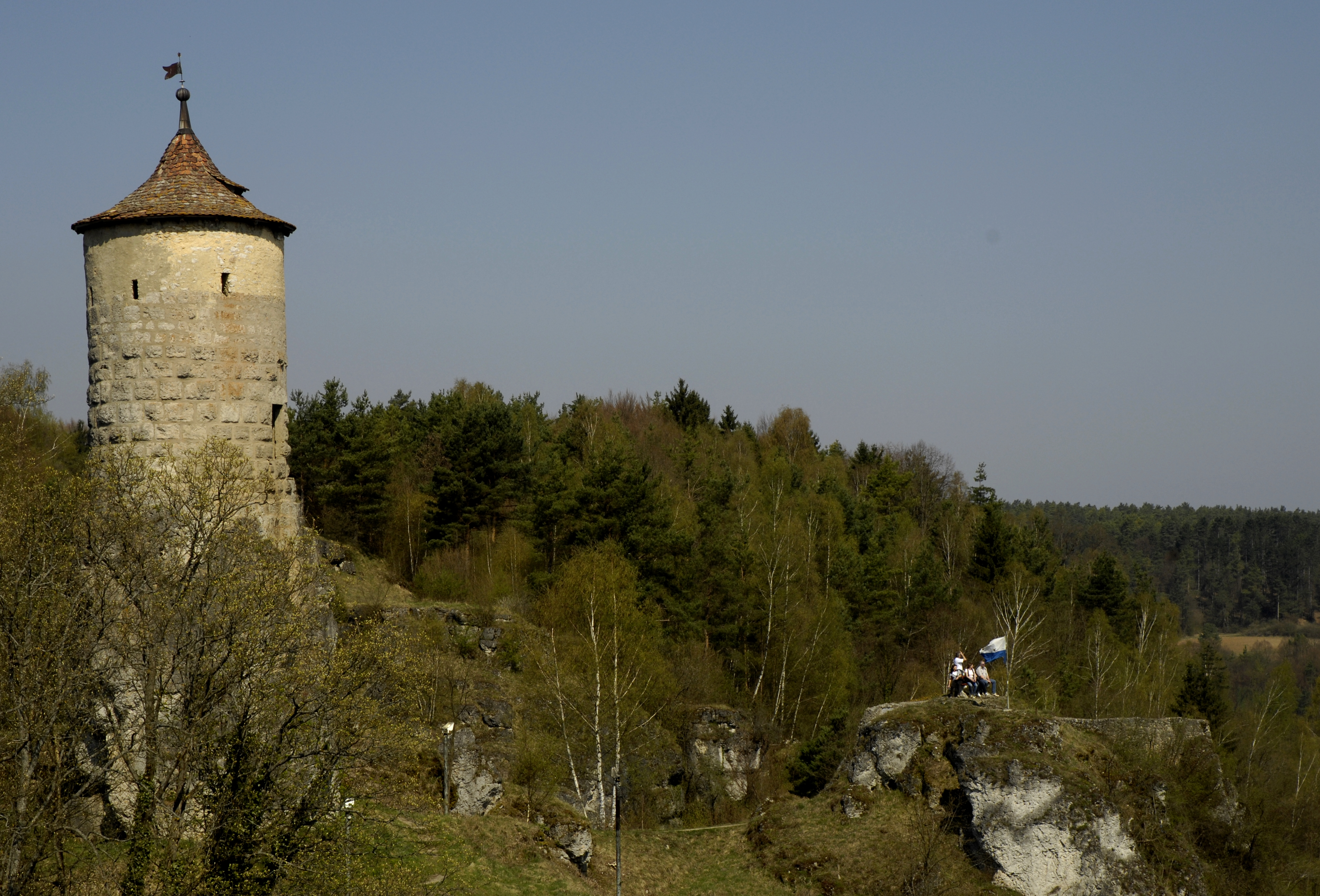 Waischenfeld, Wiesenttal, Turm der Burg über dem Tal